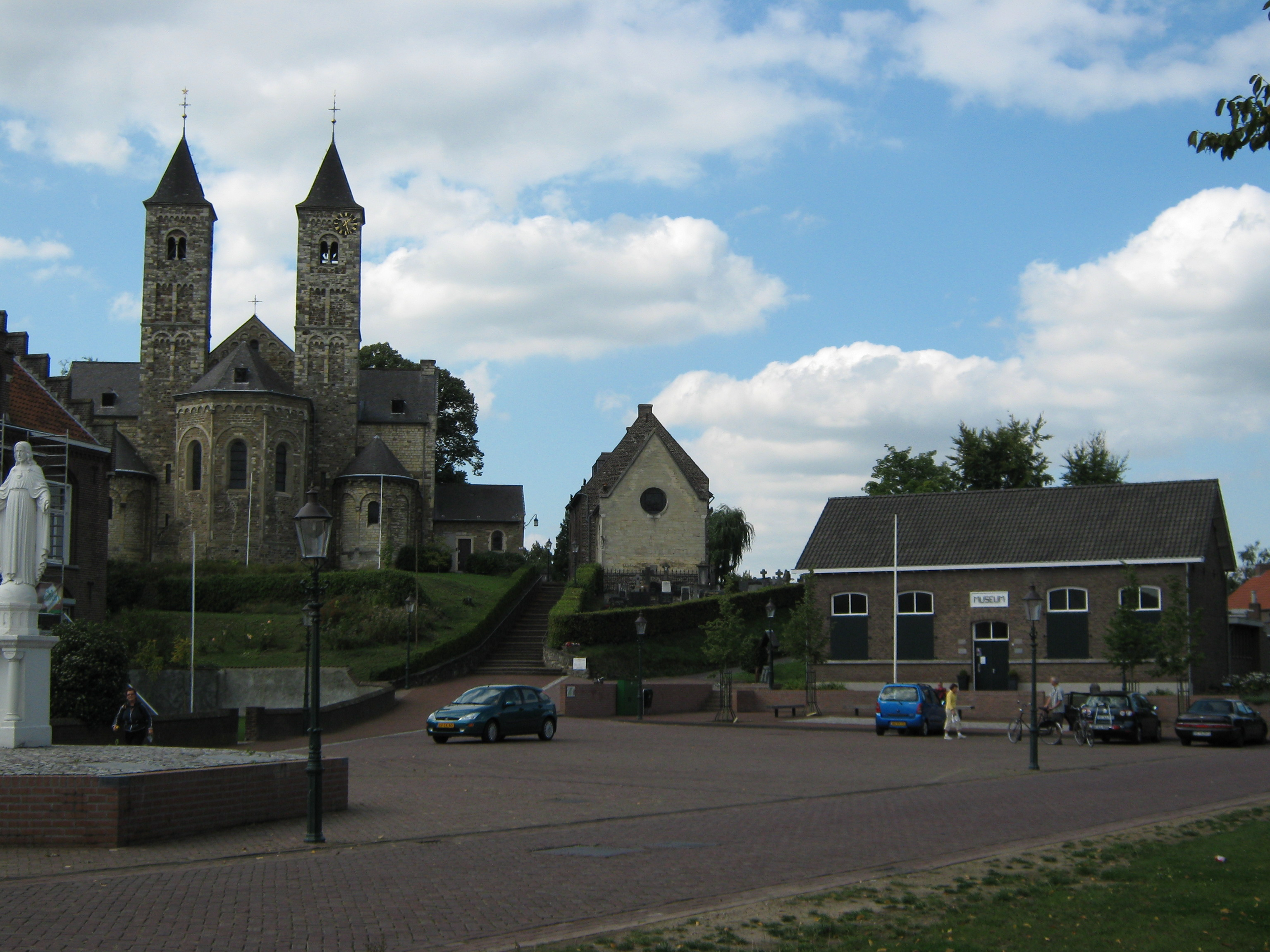 St. Odiliënberg (Limburg, NL) von links nach Rechts: Basilika von Wiro, Plechelmus en Otgerus